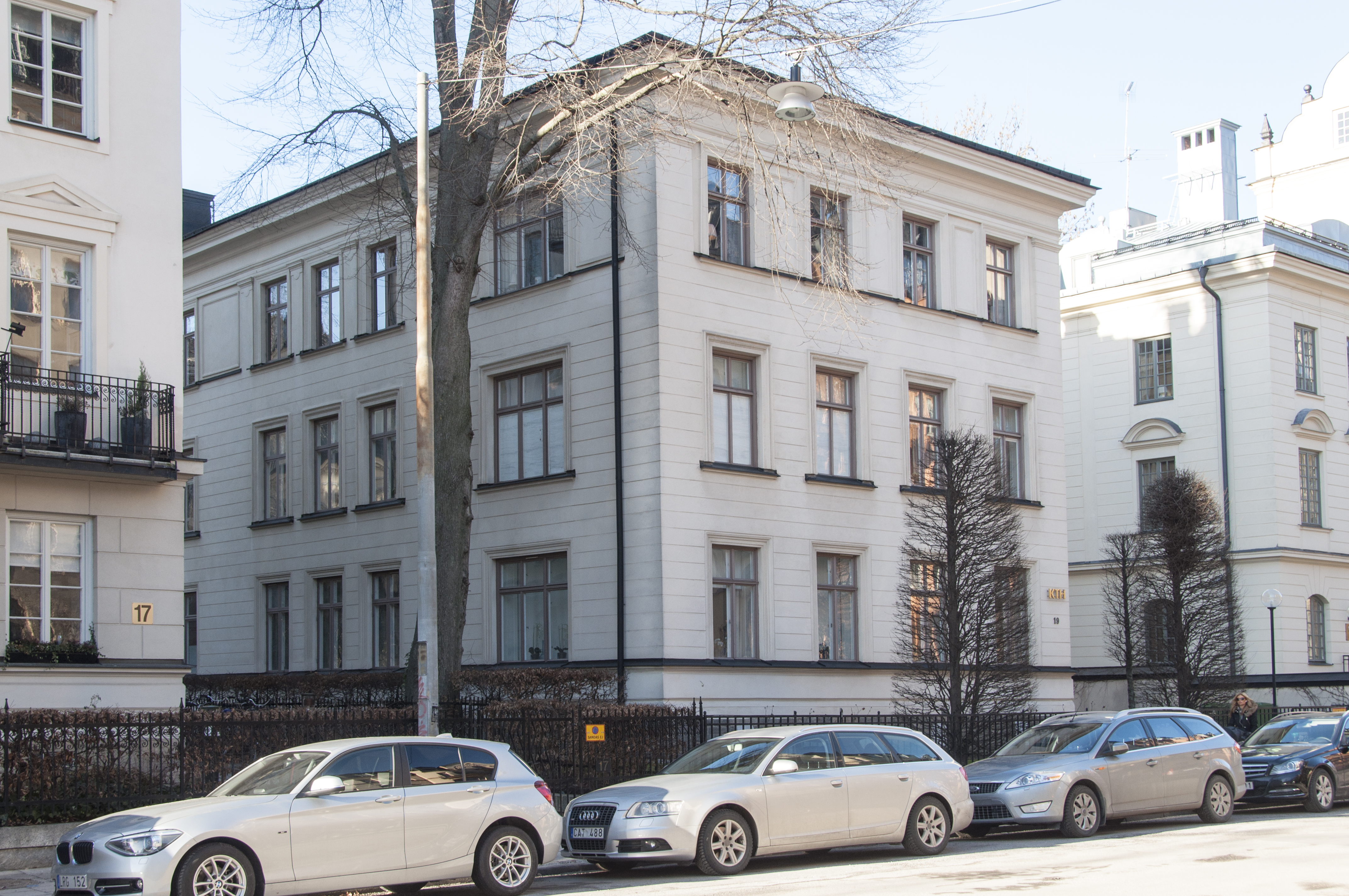 Tallen 18, Villagatan 19, Nybyggnadsår 1880, Axel Kumlien (Byggherre) Johan Peter Schonberg (Byggmästare) Kumlien Axel & Kumlien Hjalmar (Arkitekt)